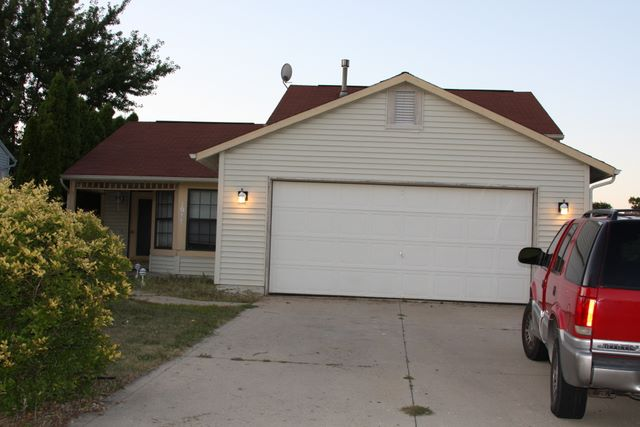 1911 Hidden River Dr